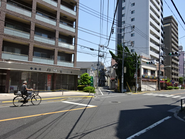 「錦町楽天地」の入り口です。車の後ろ姿が見えます。入口左のマンション1階の薬局は昔からの薬局？入口右にパン屋と床屋さん。